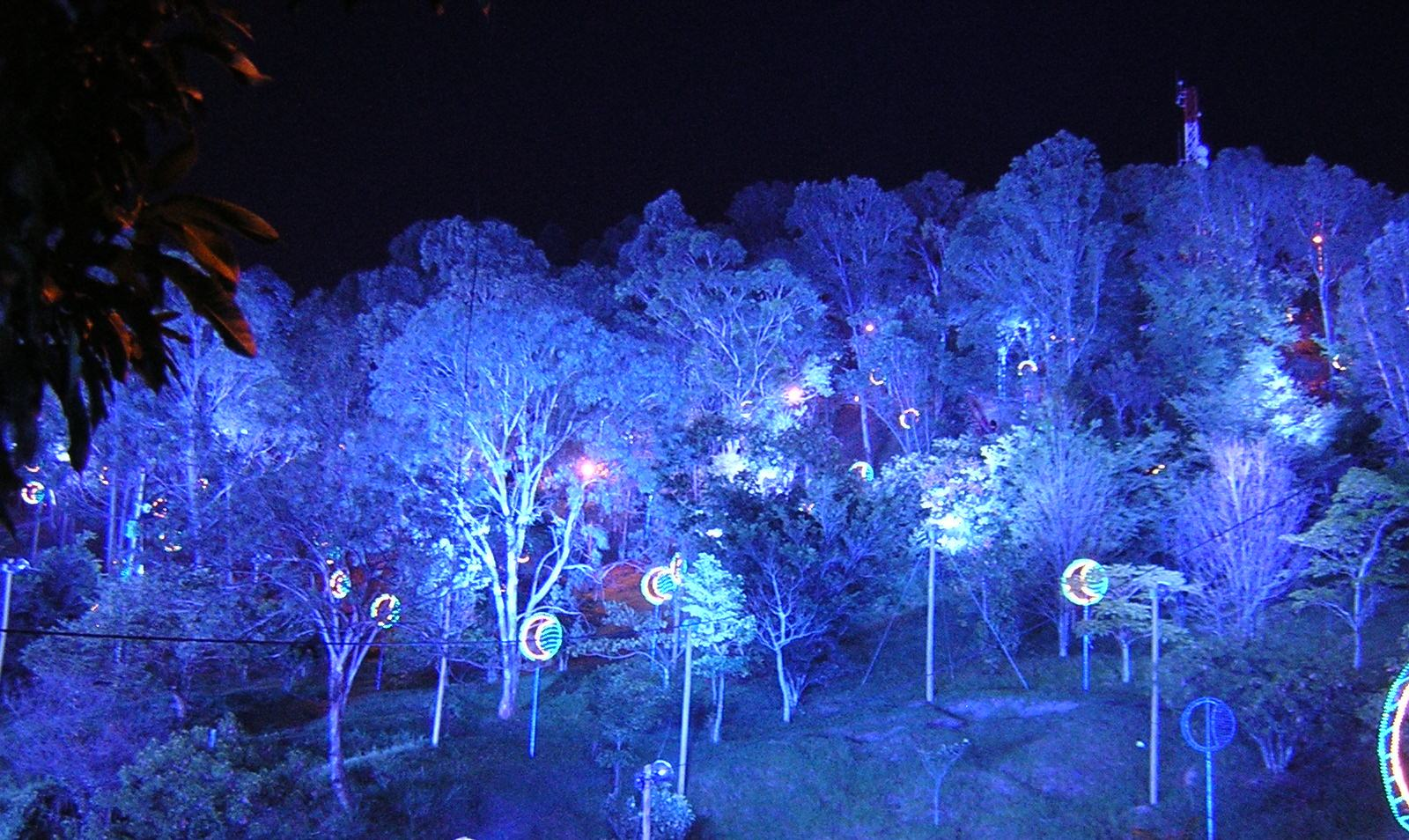 Alumbrados Navideños en el Cerro Nutibara 2006, Medellín, Colombia